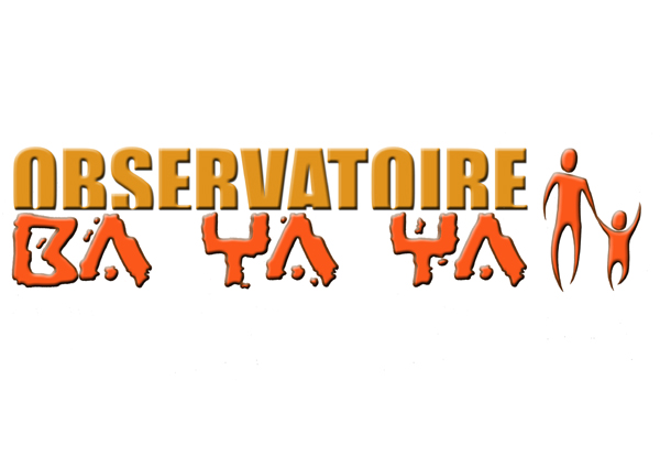 Logo officiel